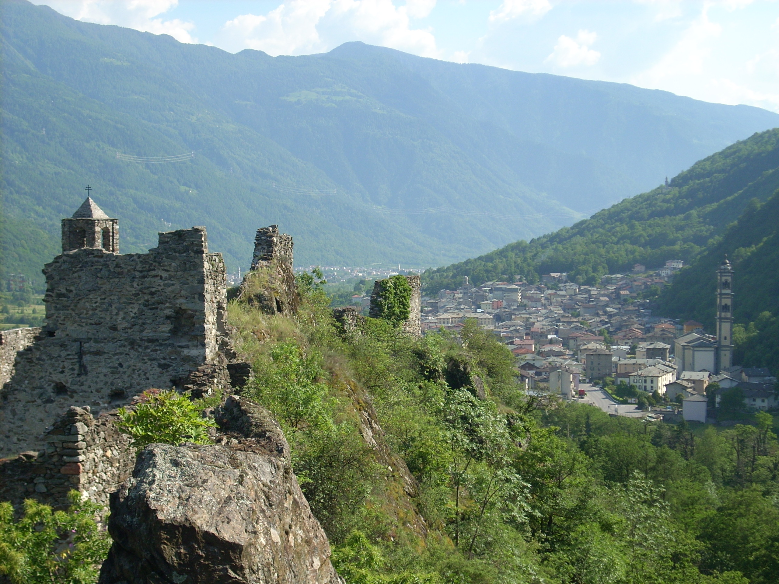 CASTELLO DI S.FAUSTINO SULLO SFONDO GROSOTTO